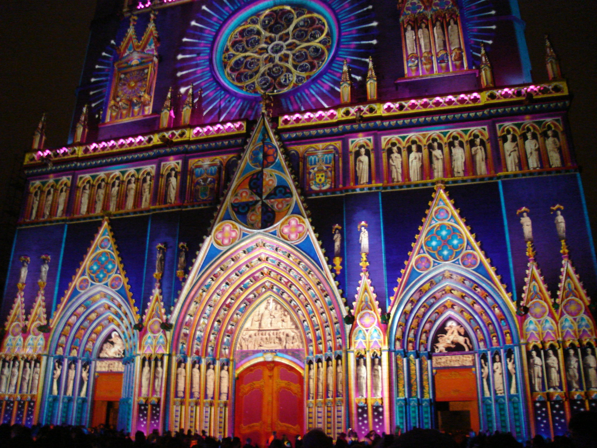 Les portails